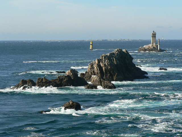 La pointe du Raz, dans le Finistère (Bretagne), France